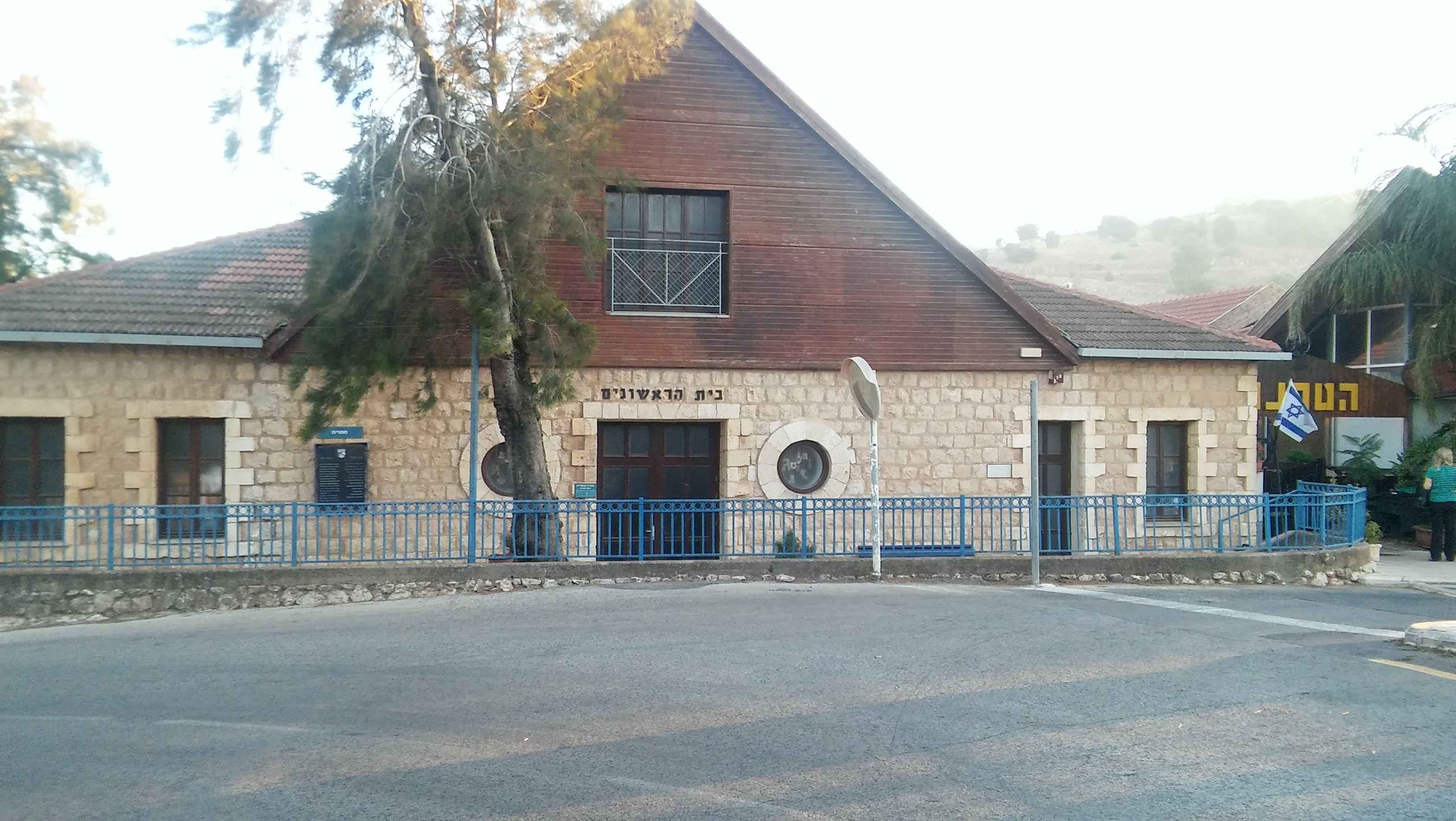 מטולה - רחוב הראשונים - בית הראשונים